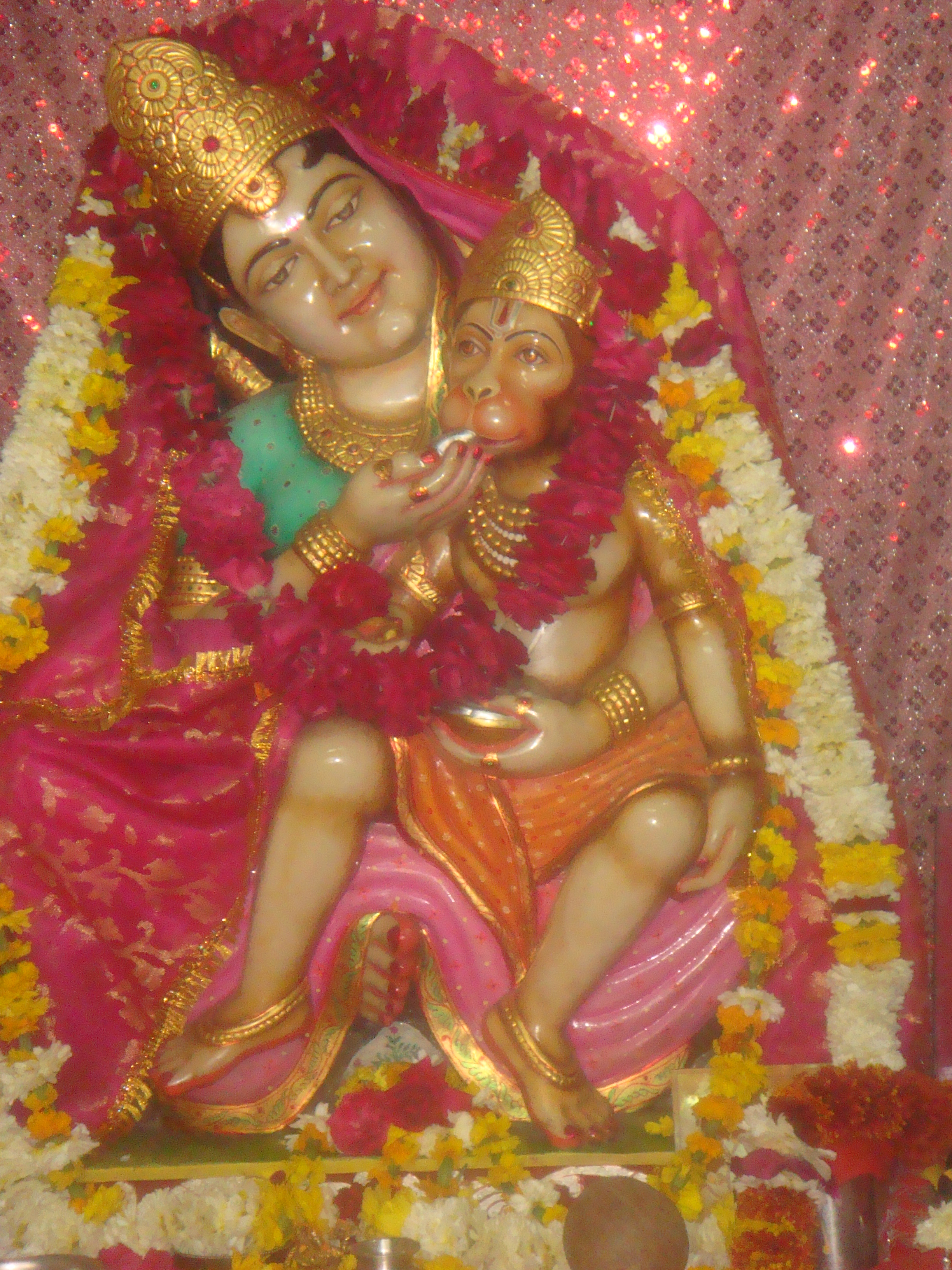 An idol of Anjani Mata having son Hanuman in her lap in the Anjani Mata temple, Choumu, taken during Pad Yatra 2008.